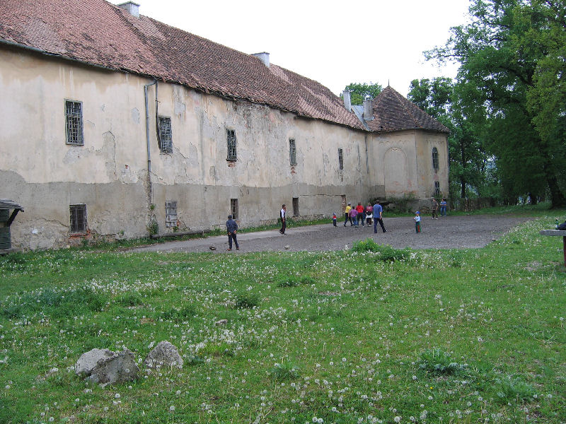 Castelul de la Gilău 01